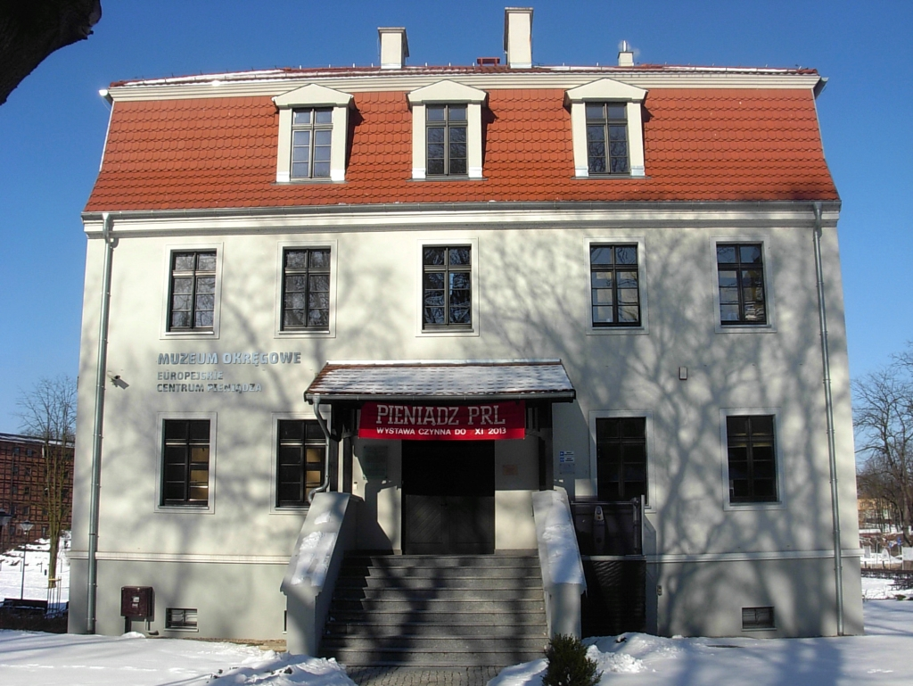 Europejskie Centrum Pieniądza na Wyspie Młyńskiej